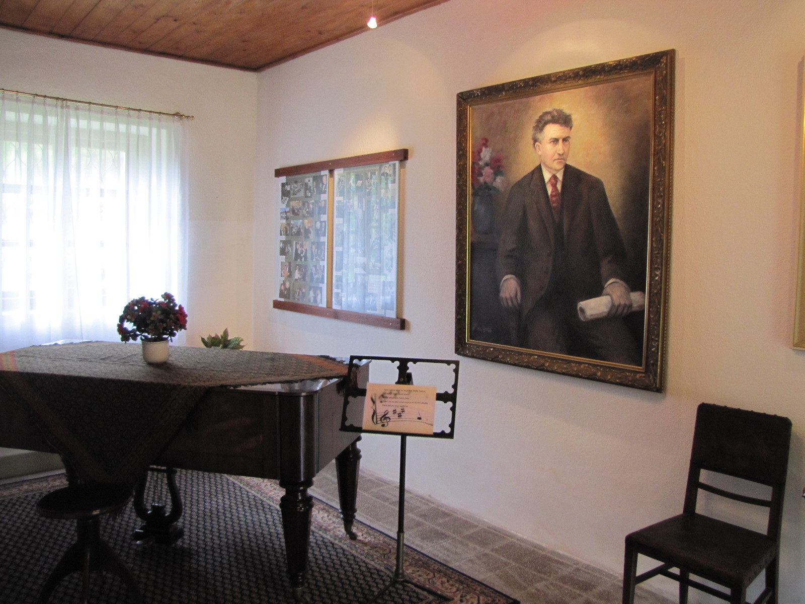 Památník Josefa Suka - interiér